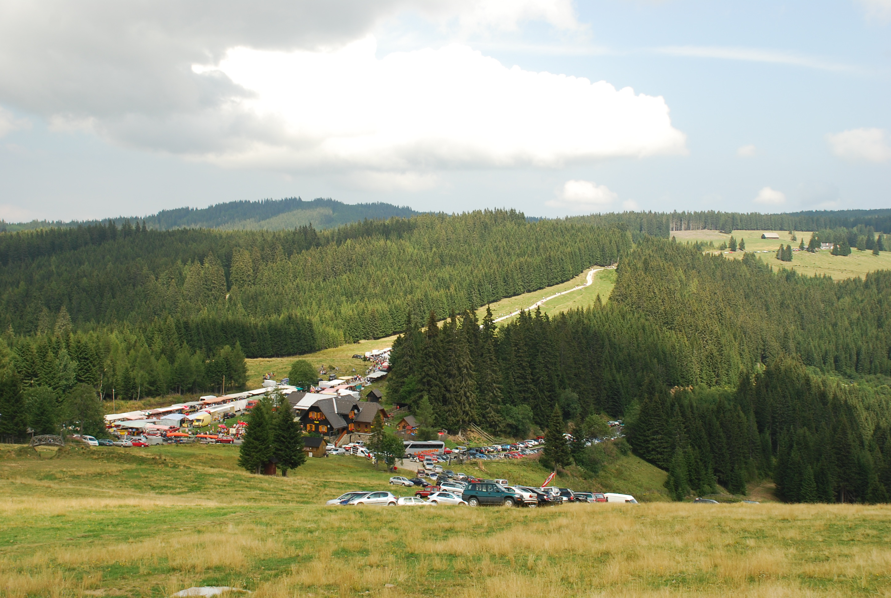 zweiter Hebalmkirtag 2007